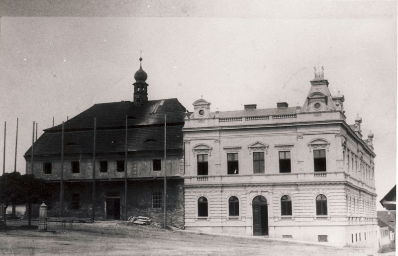 Blovická radnice a okresní soud během přestavby v roce 1892